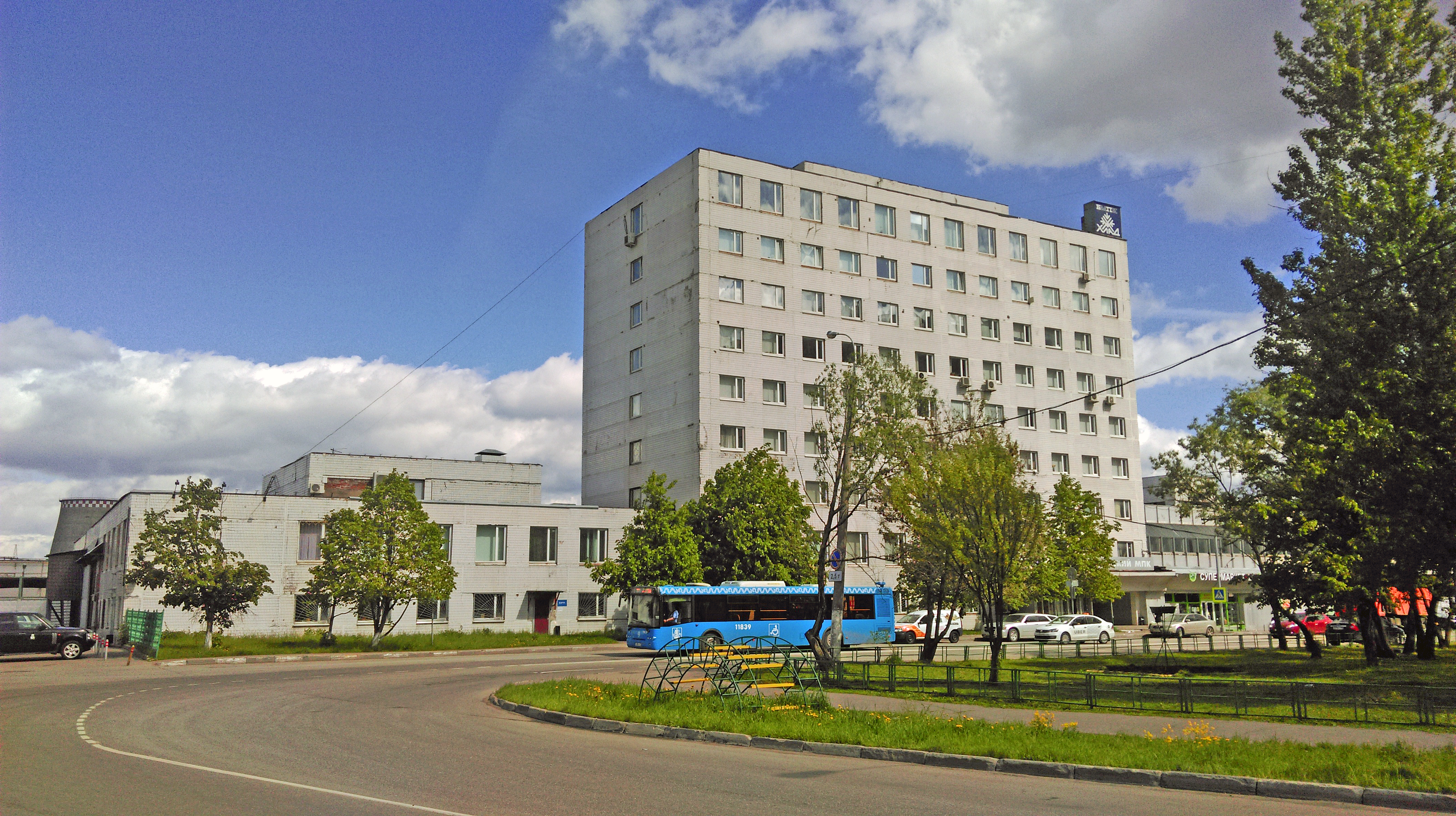 Административное здание Бусиновского мясоперерабатывающего комбината